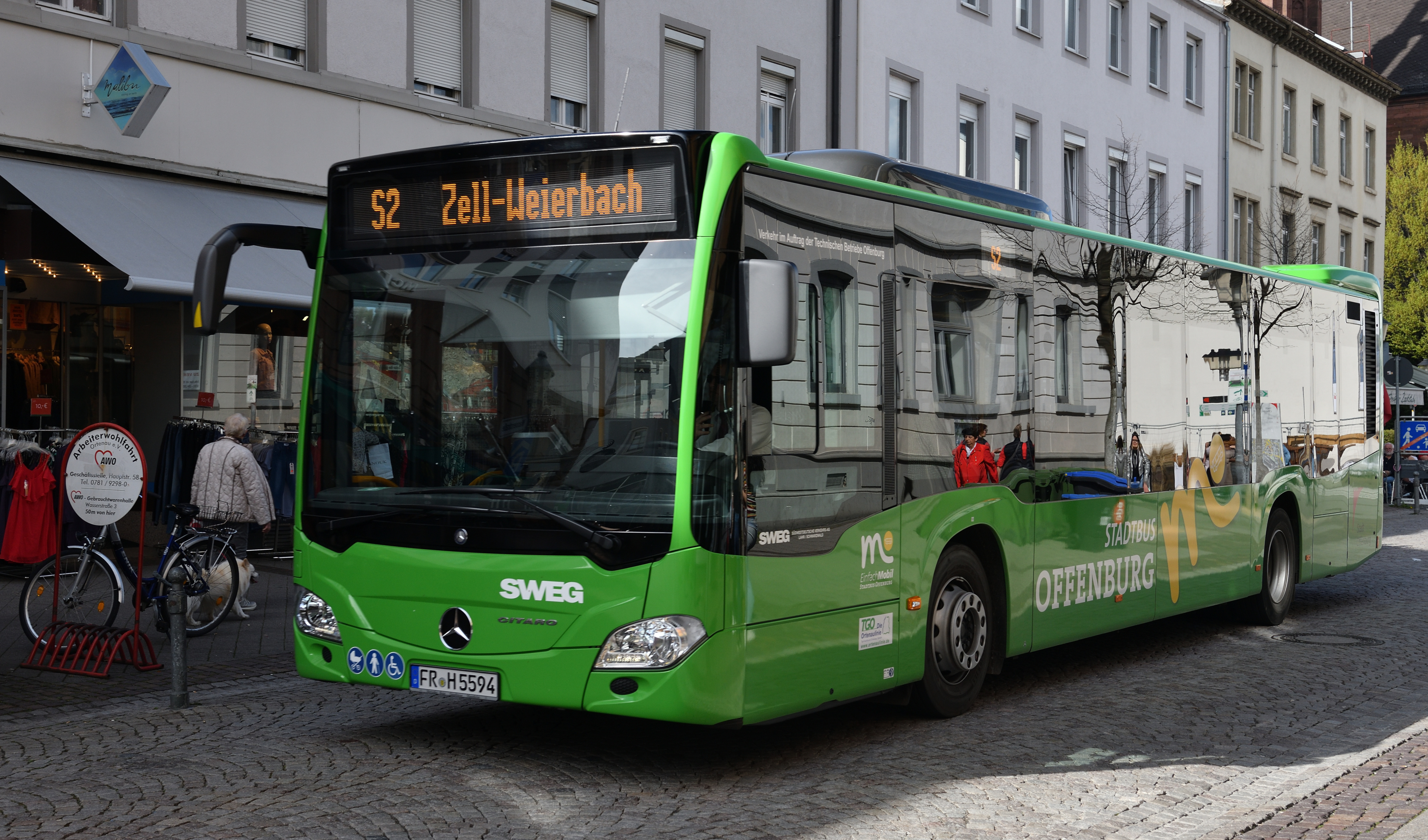 Offenburg: Stadtbus